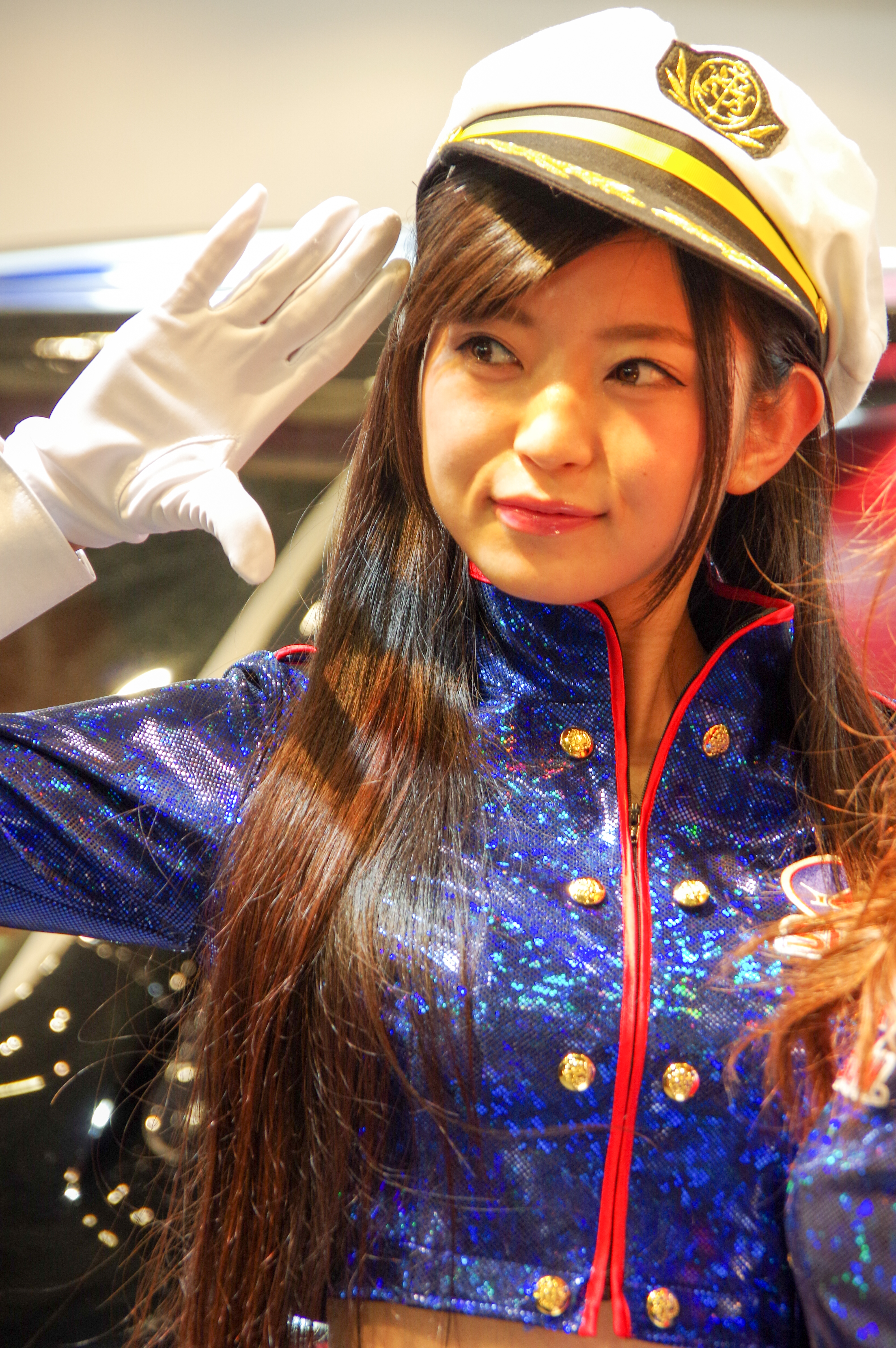 TOKYO AUTO SALON 2016 _54